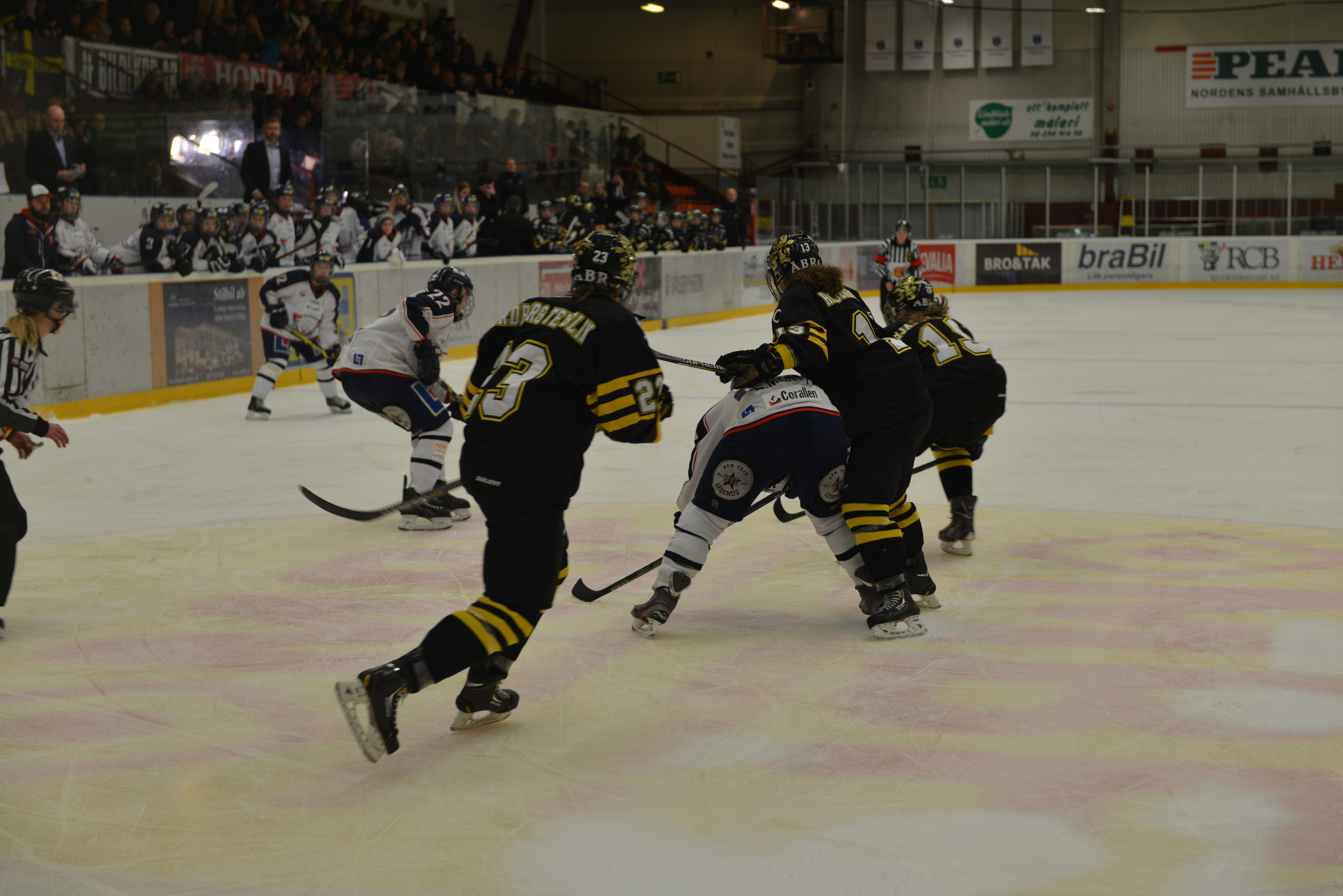 SM-final 1 i slutspelet i ishockey för damer säsongen 2014/2015 mellan AIK Ishockey Damer och Linköpings HC Dam. Matchen spelades i Vilundaparkens Ishall i Upplands Väsby och slutade 0-2. Matchfakta här.